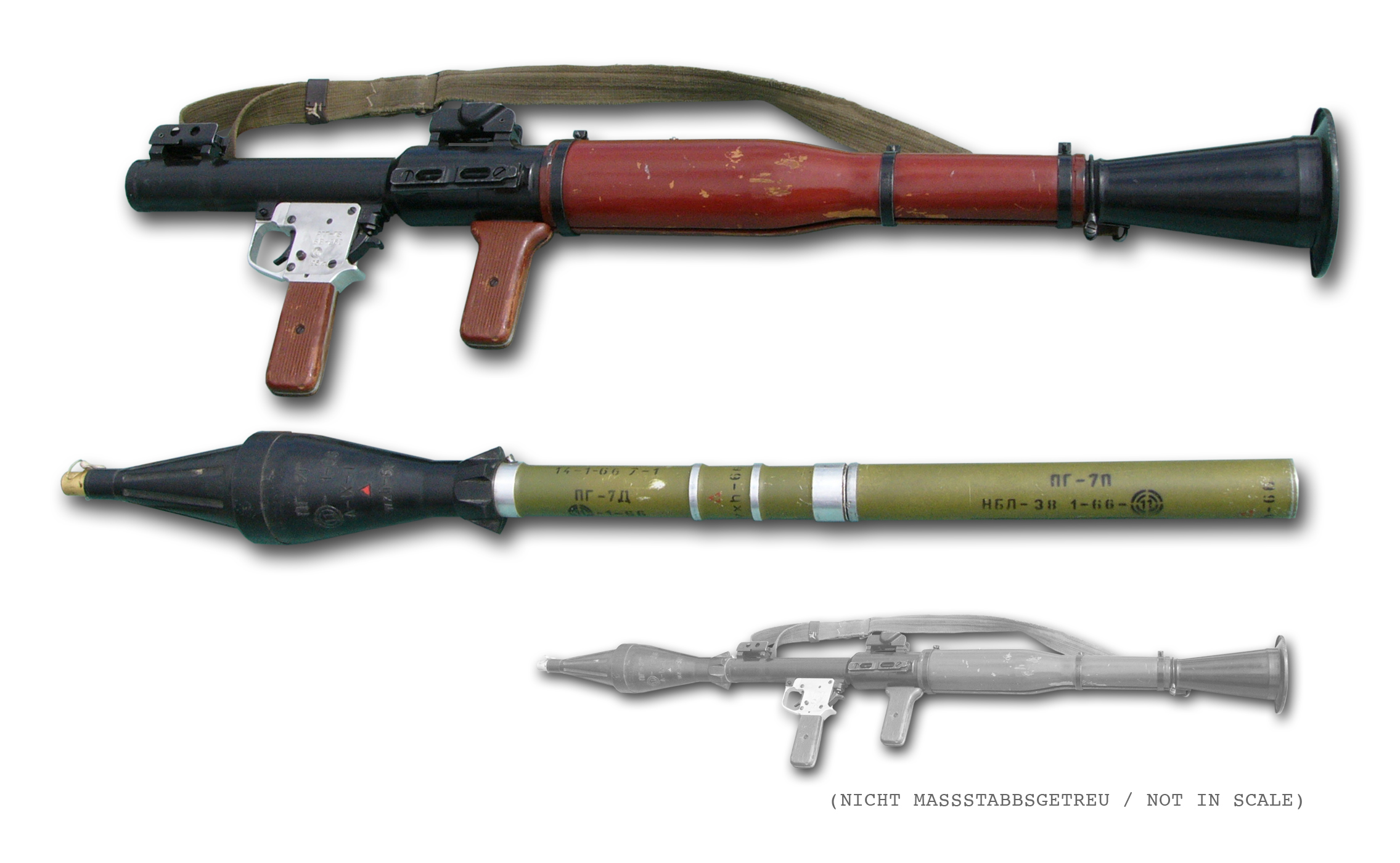 Reaktive Panzerbüchse "RPG-7" (Sowjetunion/Russland)